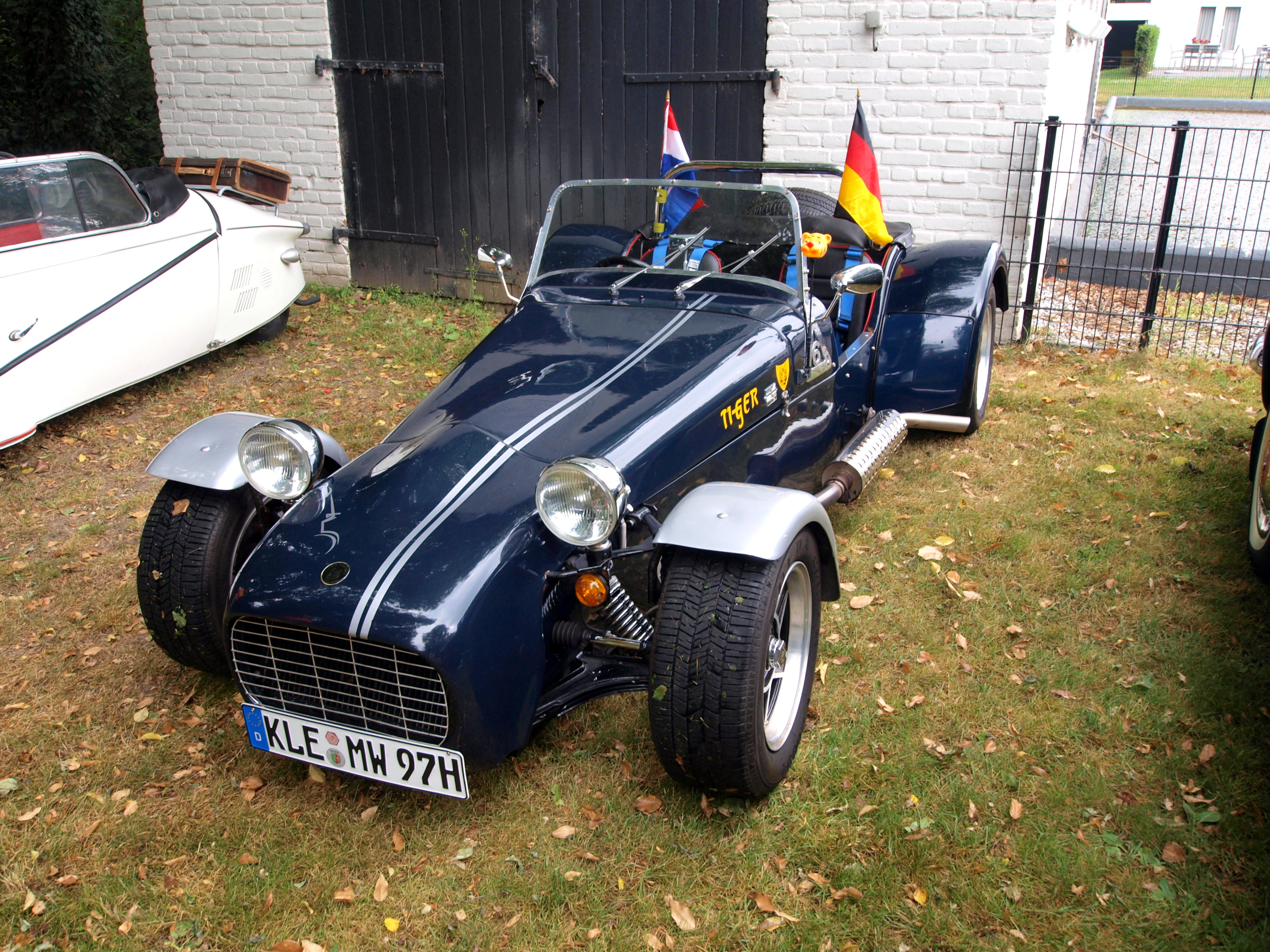 Lotus Super Seven 'Tiger'